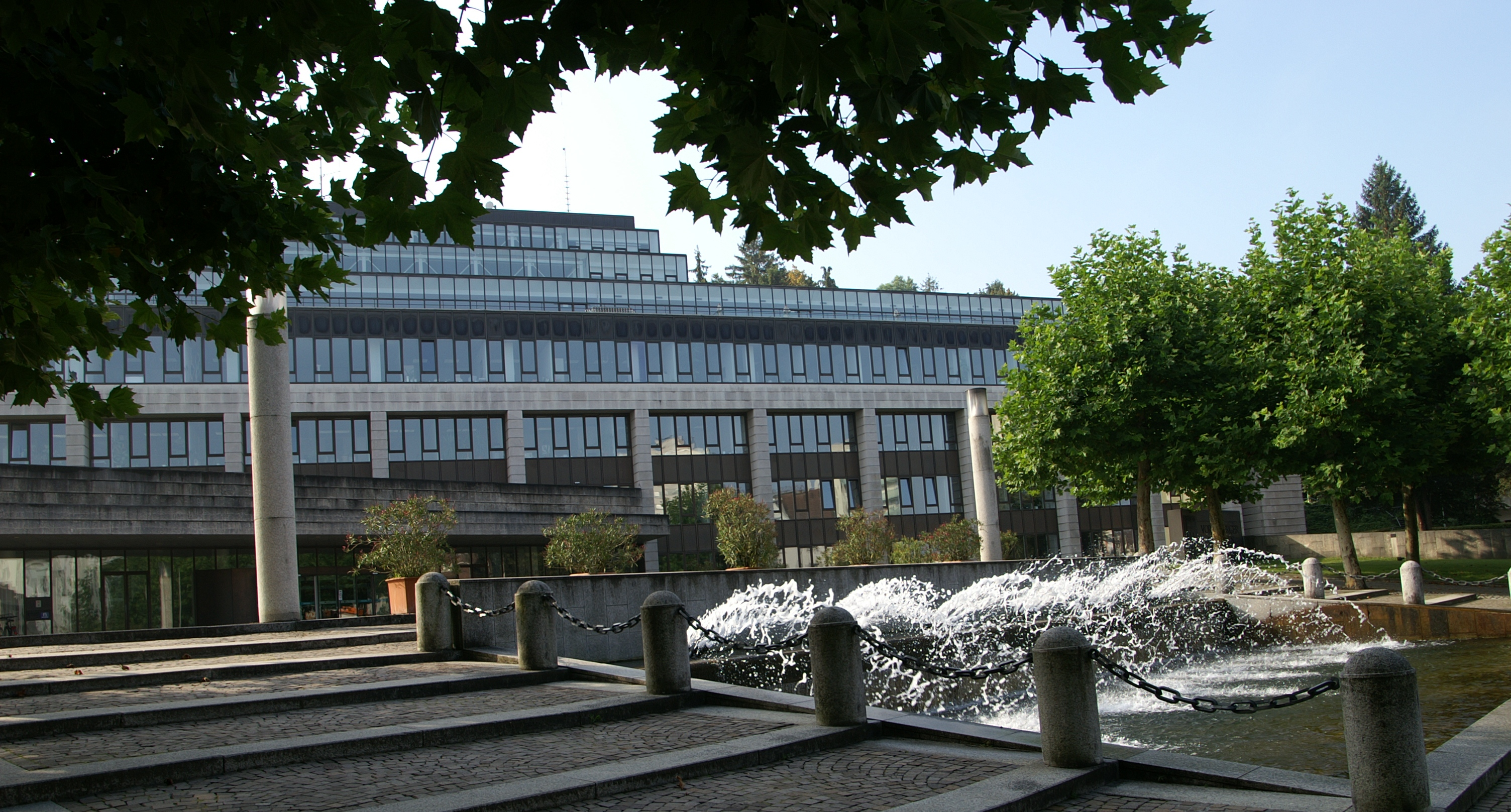 Landhaus Bregenz, Sitz der Vorarlberger Landesregierung. Architekt: Holzbauer